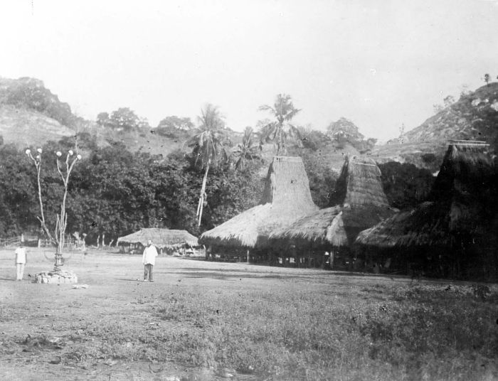 Negatief. Kampong Oemabara op Soemba met in het midden de boom met doodshoofden van gestraften en op de achtergrond het lijkenhuisje van de Radja